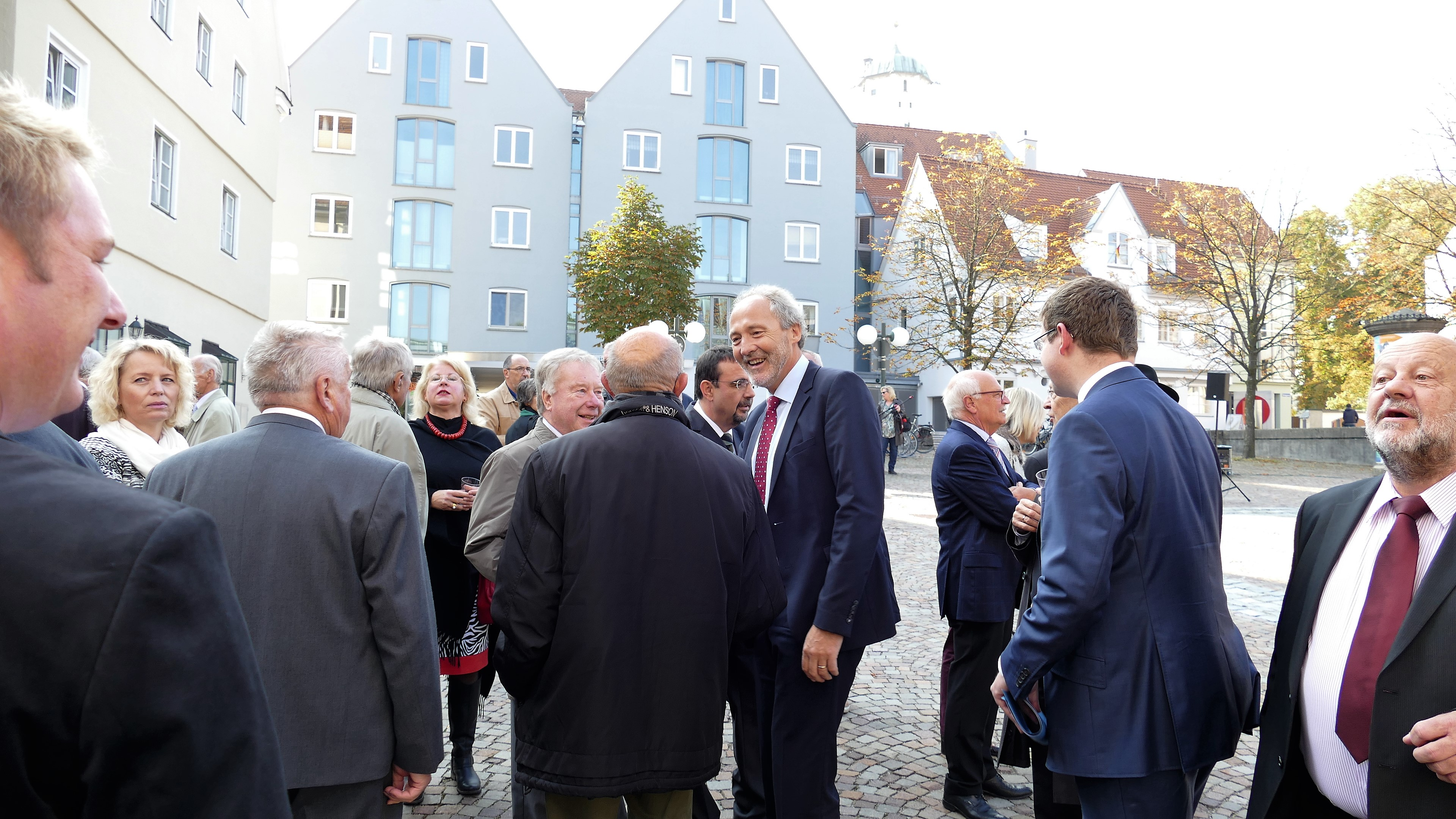 Hans-Joachim Weirather, rechts Stephan Stracke (MdB), links im Hintergrund Klaus Holetschek (MdL) bei der Einweihung des Platzes der Deutschen Einheit in Memmingen